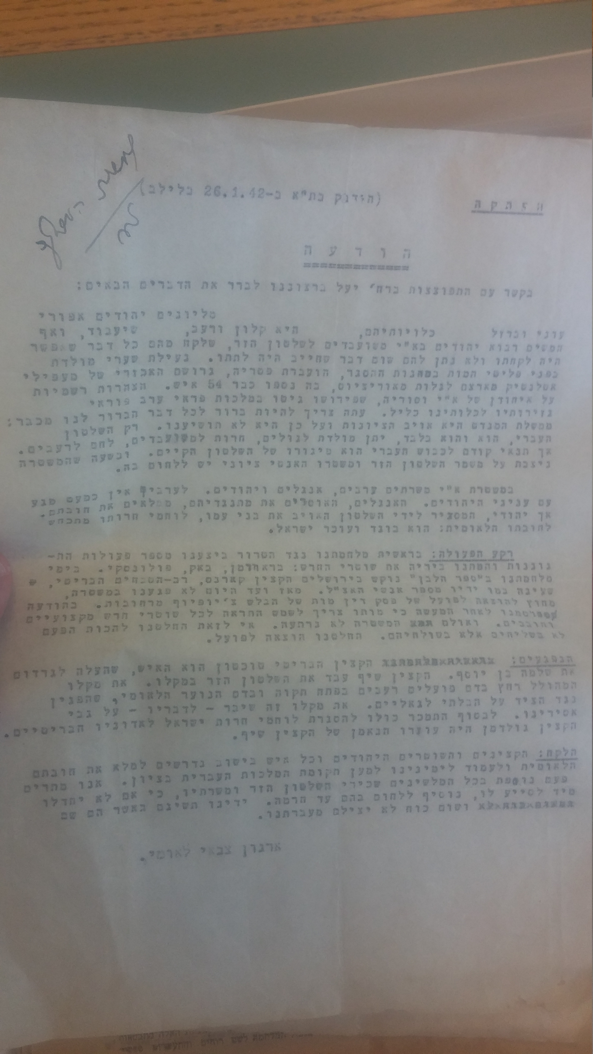 הכרוז פורסם ביום 26.01.42 וניתן לראותו בארכיון תנועת העבודה בבית ברל. בכרוז מוסבר מדוע הותר דמם - מבחינת הלח"י - של הקצינים שנהרגו בפעולה ברחוב יעל ובהם הקצינים היהודים שיף וגולדמן.